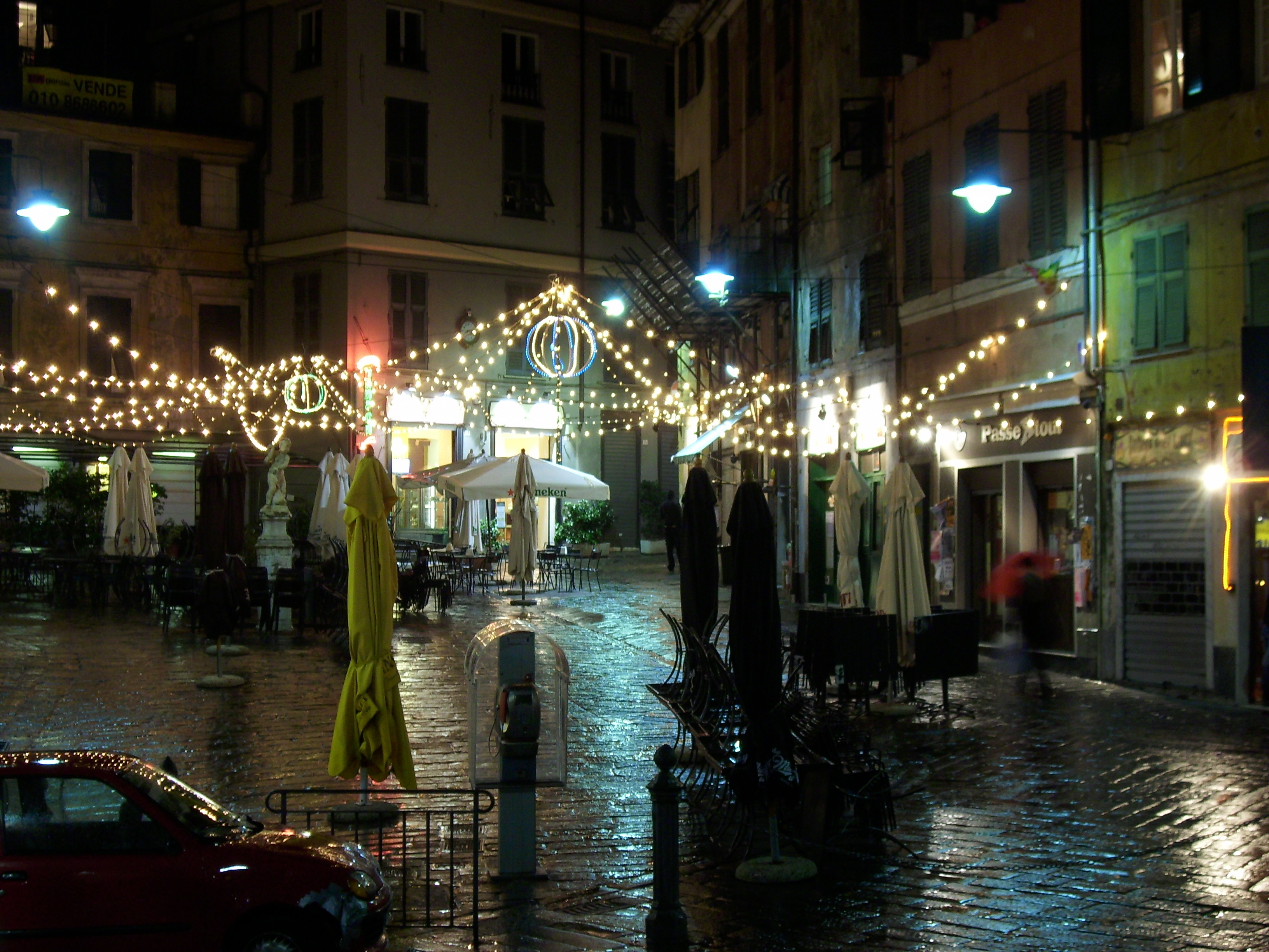 Piazza delle Erbe a Genova, nel periodo natalizio